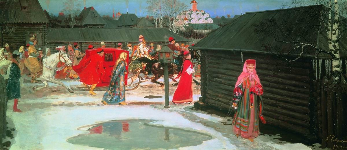 Свадебный поезд в Москве (XVII столетие). 1901. Холст, масло. 90x206,5 см. Государственная Третьяковская галерея, Москва